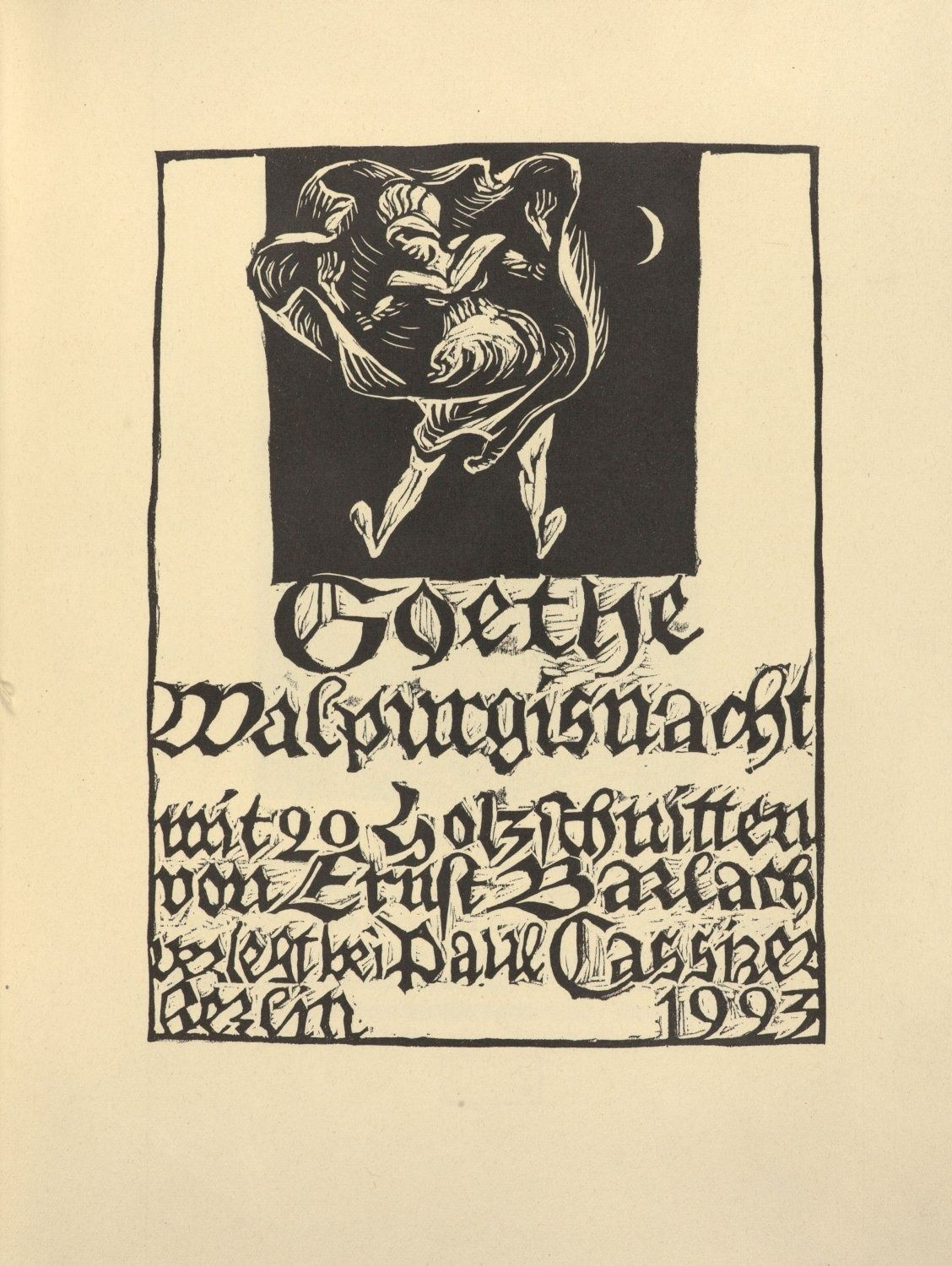 Titelseite des Buches "Walpurgisnacht" mit Holzschnitten von Ernst Barlach nach dem Text aus Goethes Faust I